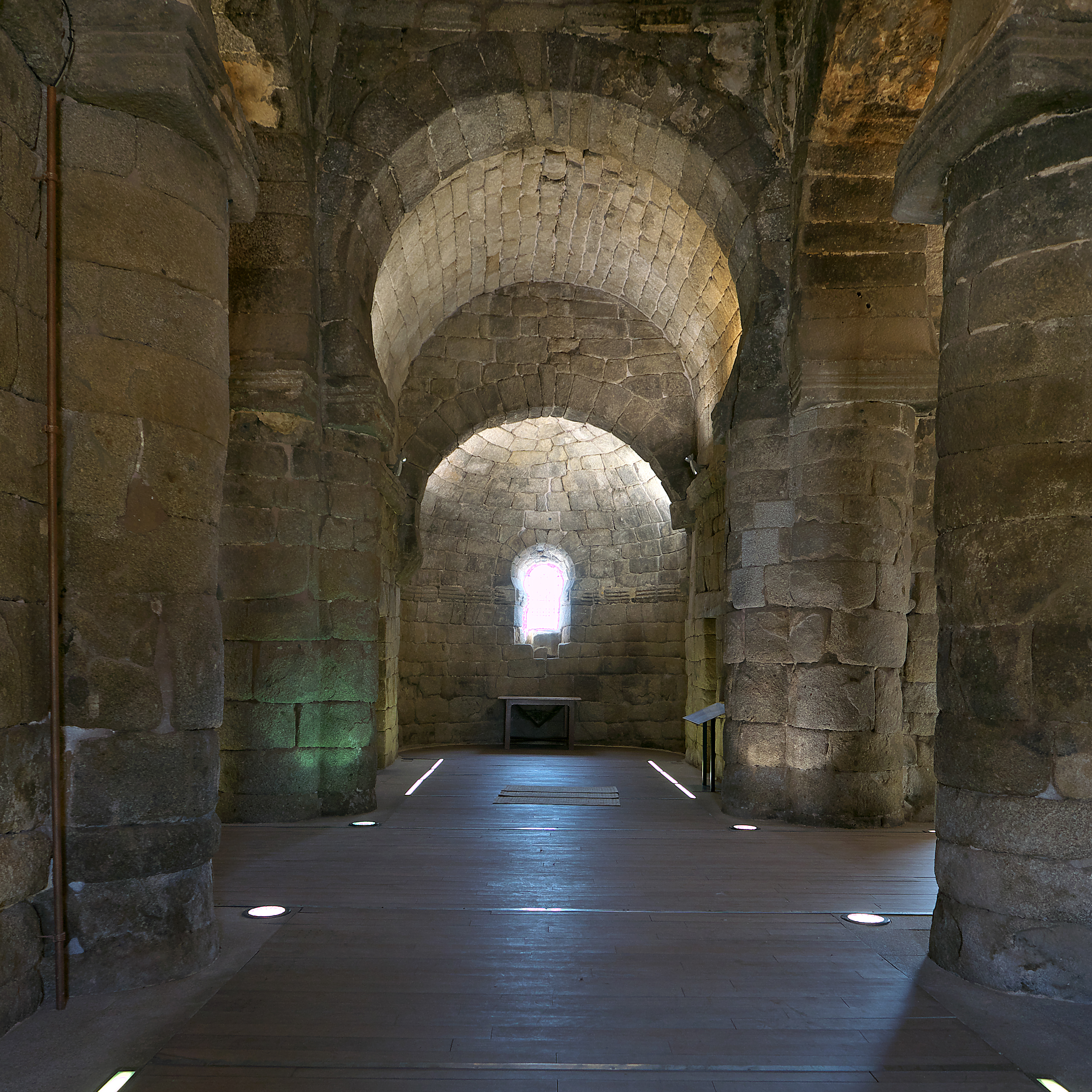 Nave central de la iglesia de planta cruciforme. Se distingue el arco de herradura. Al igual que otras edificaciones españolas clasificadas como visigodas, siempre existe la problemática de encuadrarlas como mozárabes.